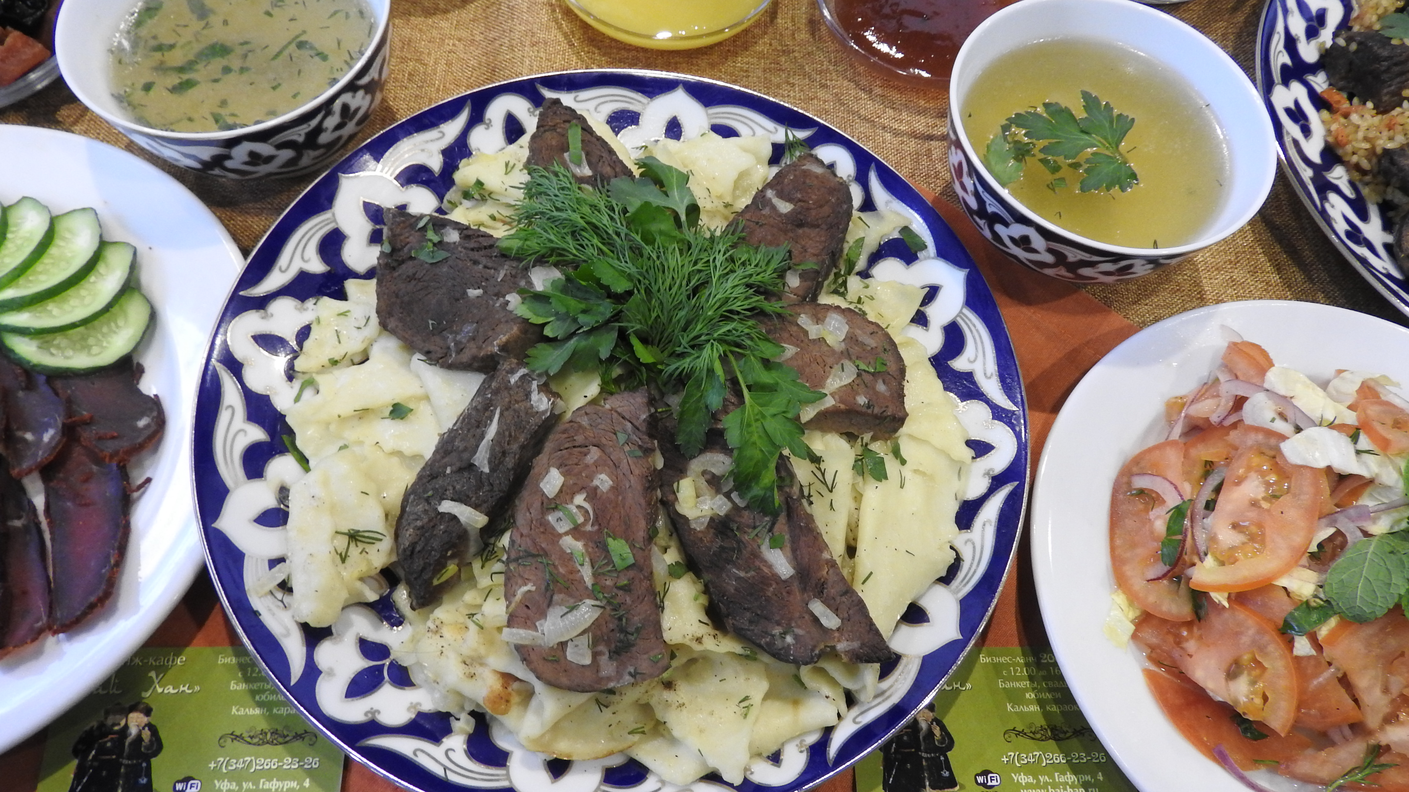 Выставка в Уфе "УФА-ЛАДЬЯ. АРТ.РЕМЕСЛА. СУВЕНИРЫ".